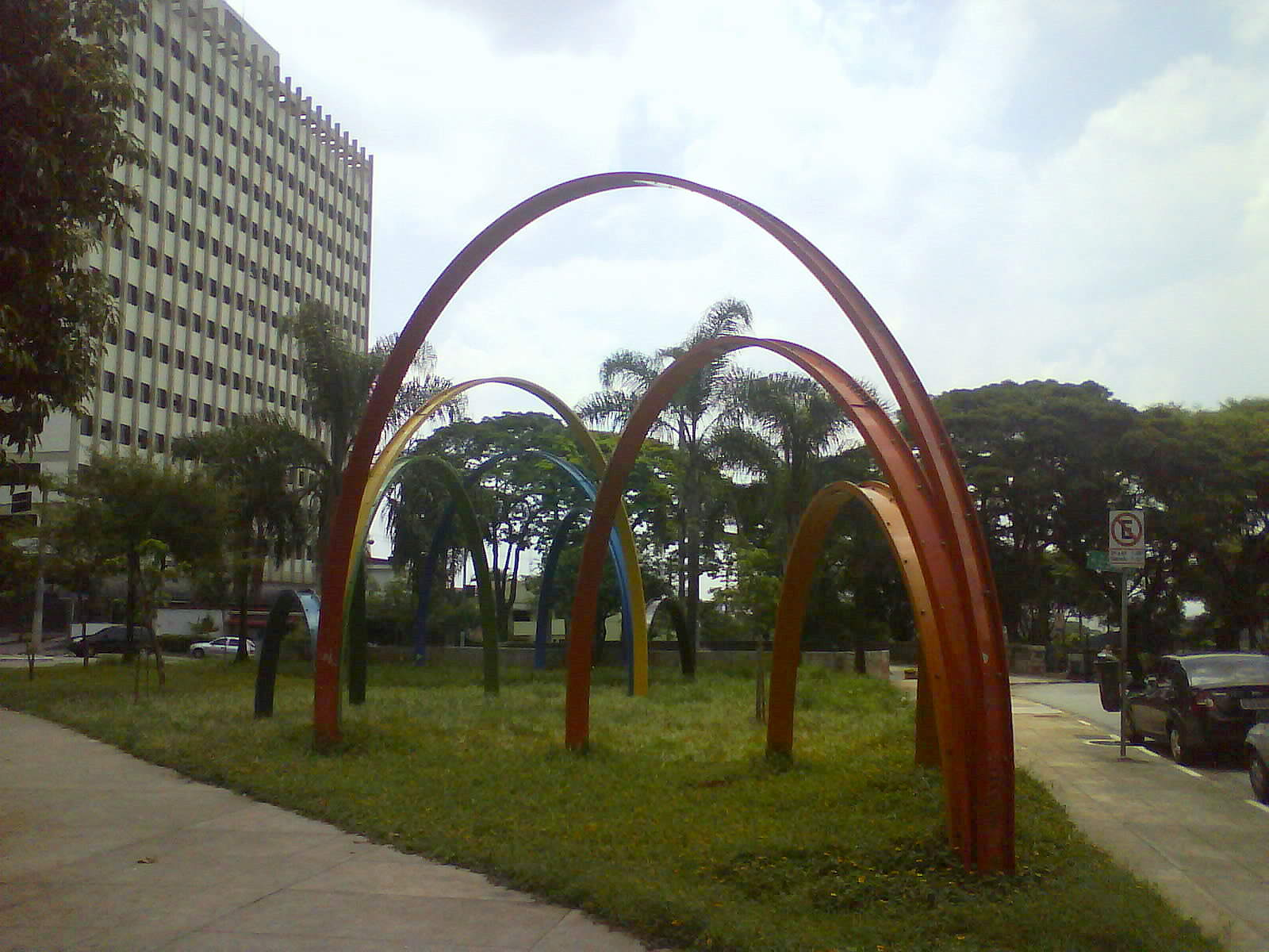 Praça dos Arcos (Praça Marechal Cordeiro de Farias), no bairro paulistano de Higienópolis, distrito de Consolação, na confluência das ruas Minas Gerais, Itápolis e das avenidas Angélica e Paulista. Os arcos metálicos são de autoria da artista plástica Lilian Amaral e do arquiteto Jorge Bassani.